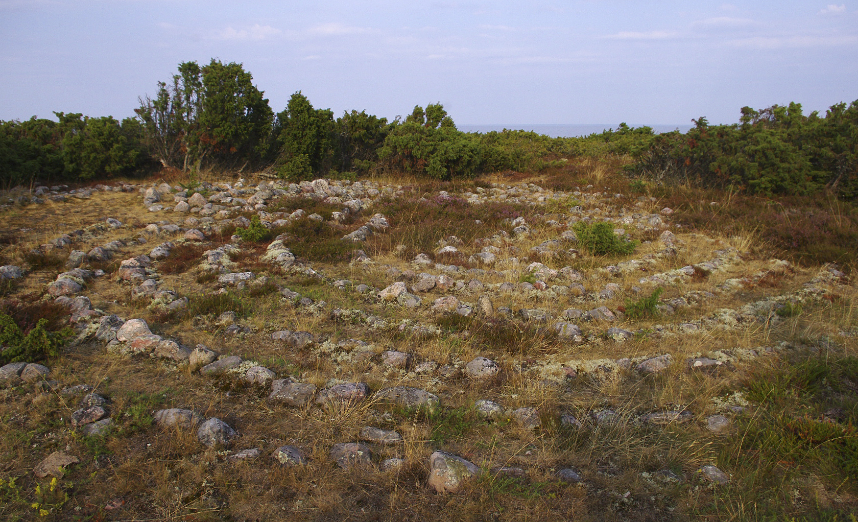 Kivilabürint